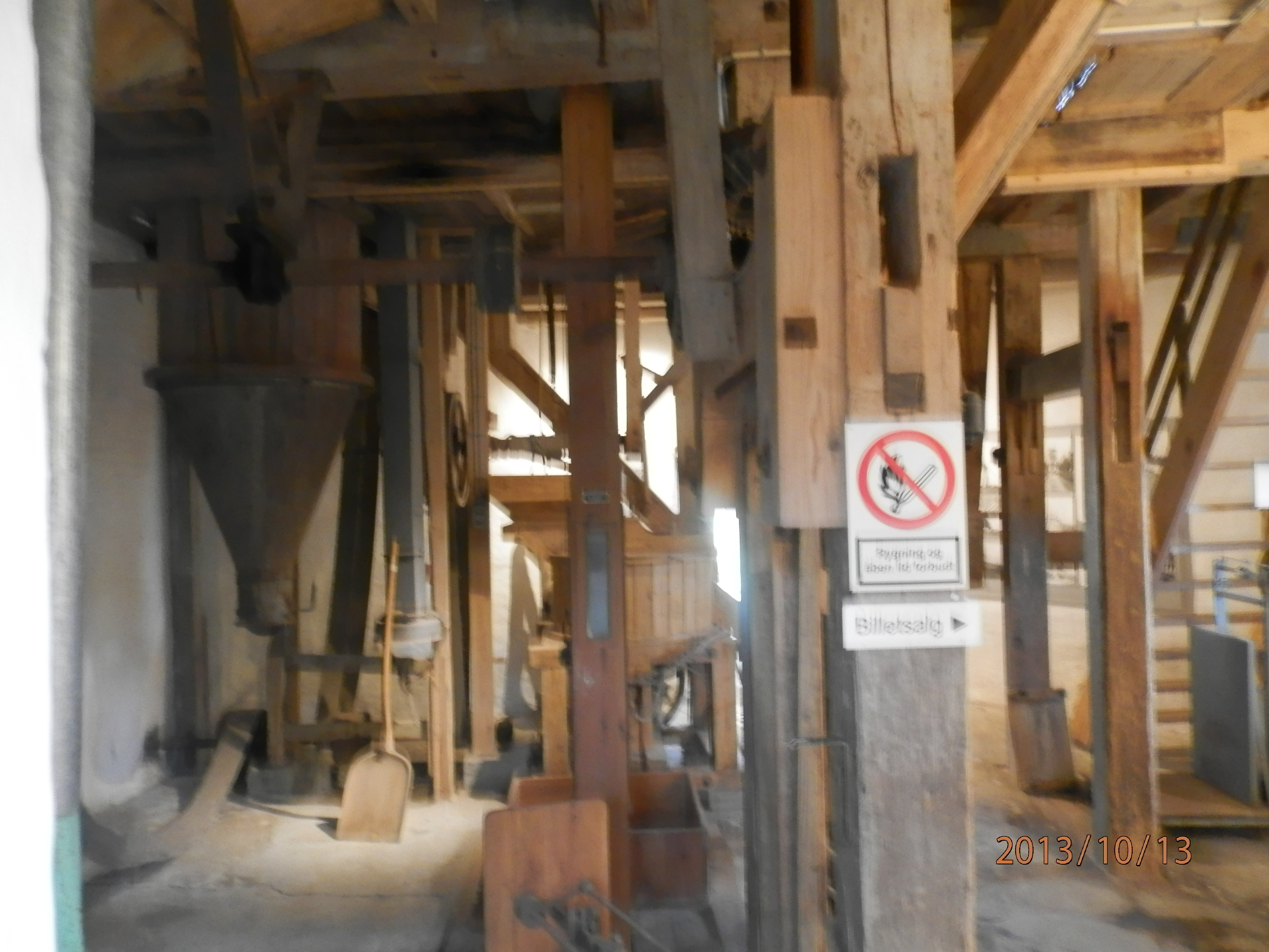 Undermølleni Gl. Rye mølle